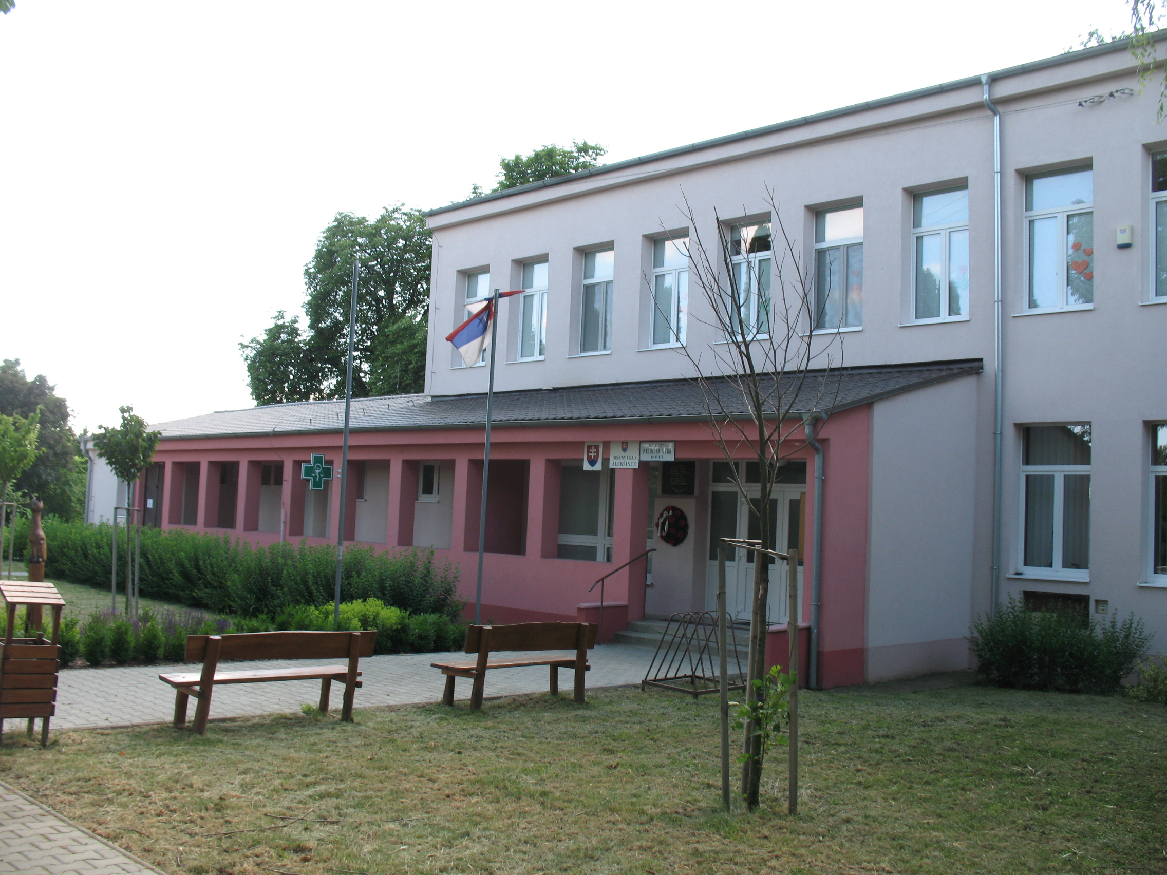 Elecske